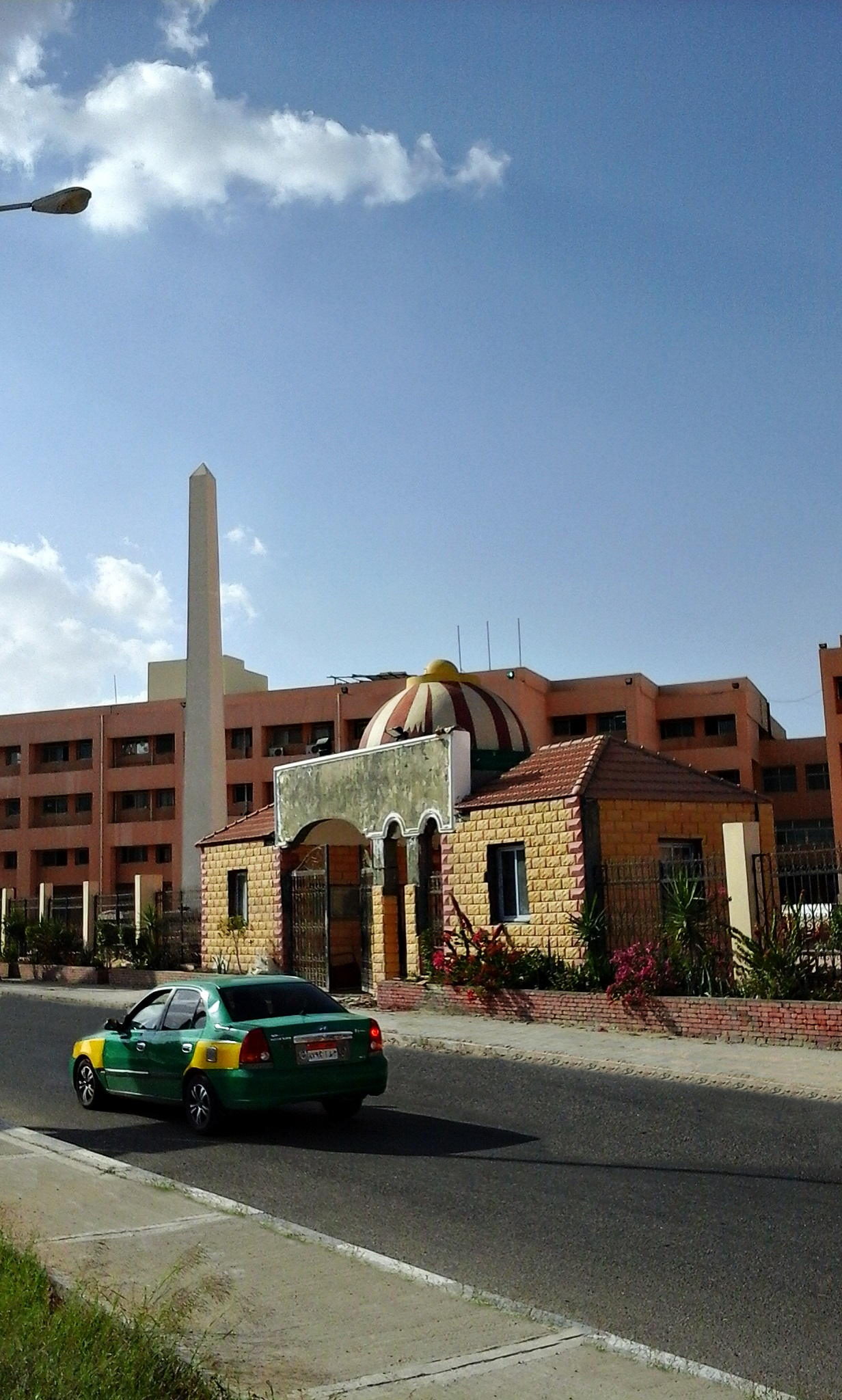 جامعة مدينة السادات، مصر